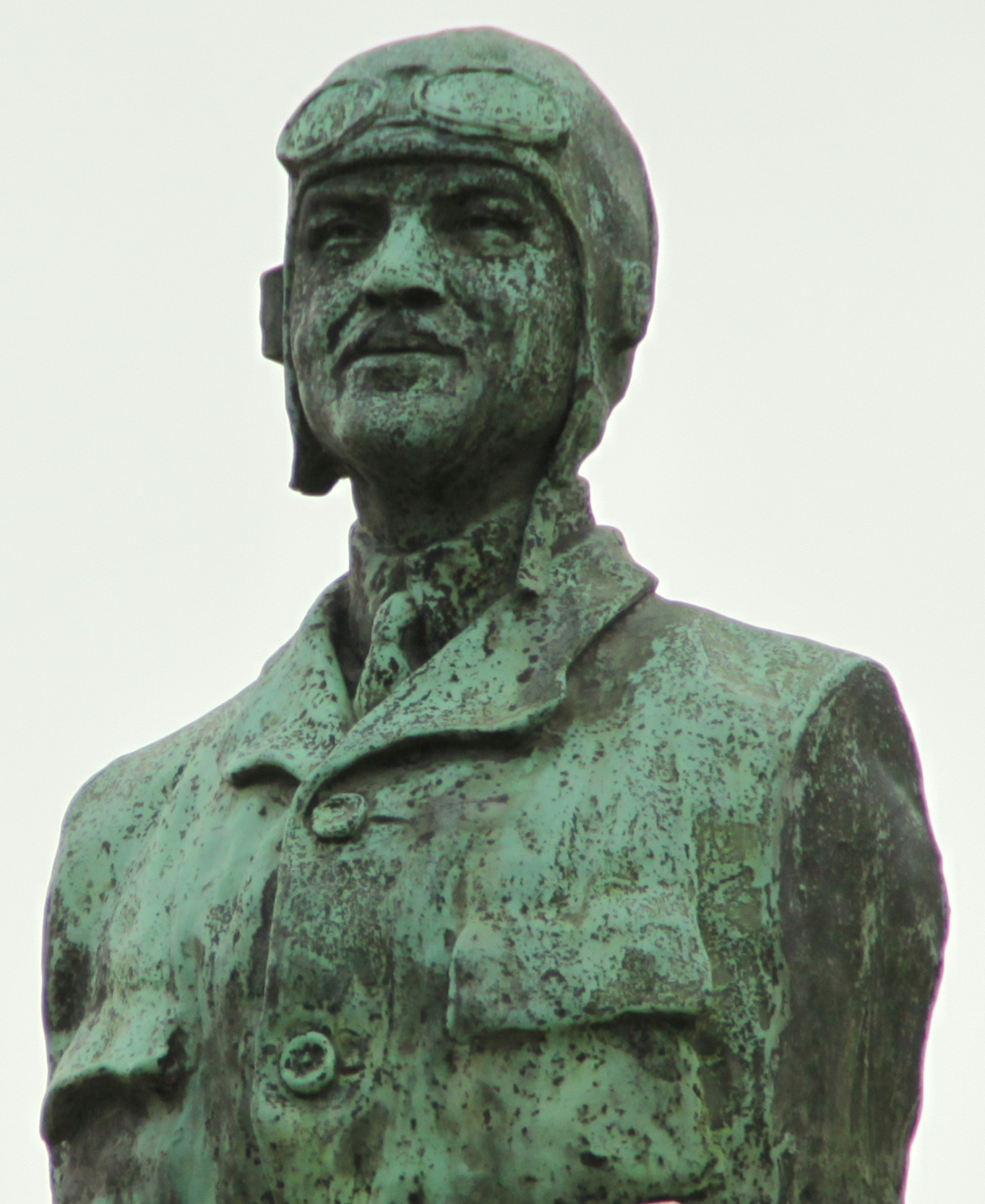 Büst vum Alfred Fronval um Monument zu Neuville-Saint-Rémy vis-à-vis vu sengem Gebuertshaus